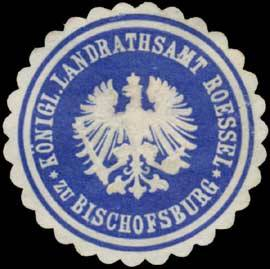 Sealing stamp Title: K. Landrathsamt Rössel/Ostpreußen Description: Roessel, blau, weiß, geprägt Place: Rößel/Ostpreußen size: 3 cm